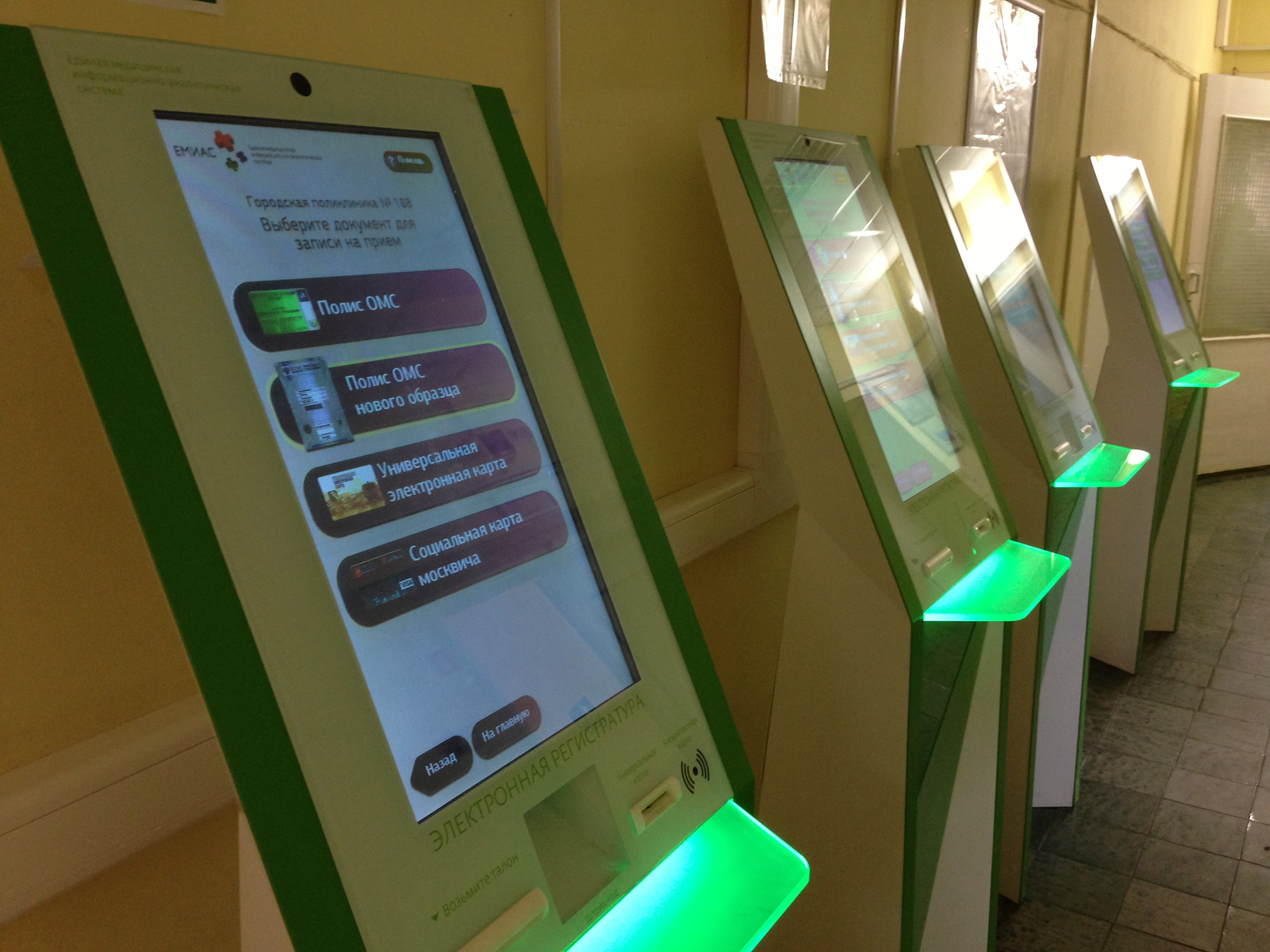 Фотография терминала «Электронная регистратура» в поликлинике